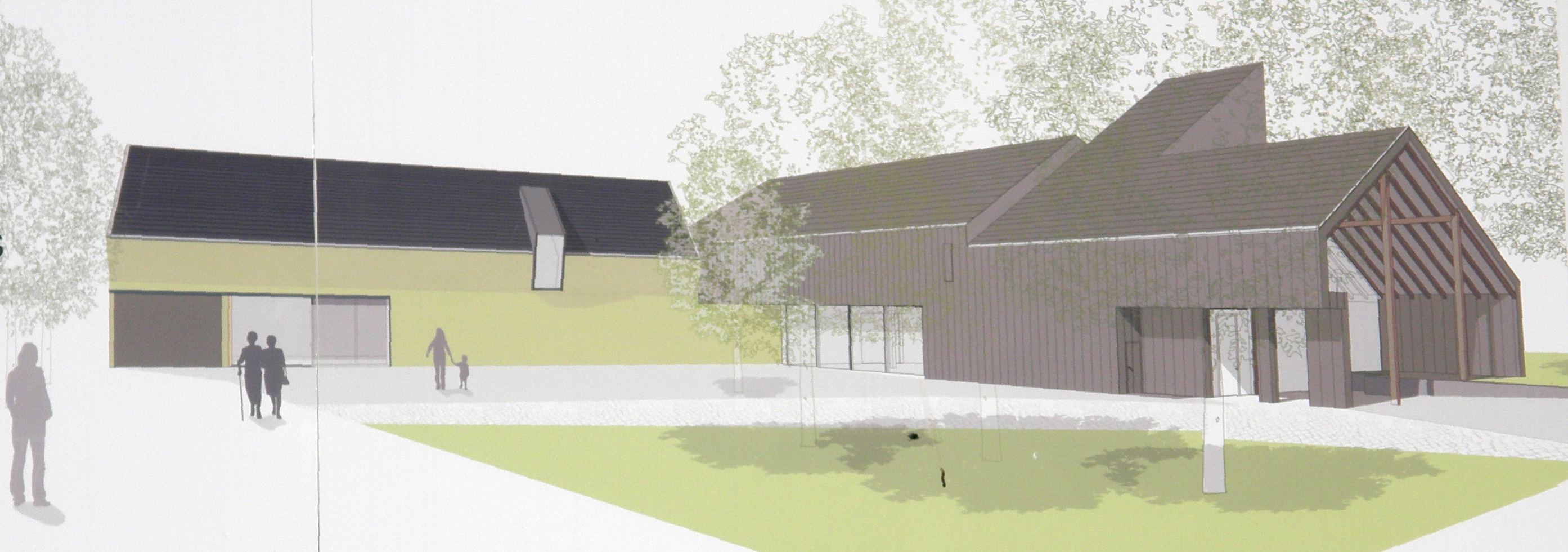 Wandlitz, Ortsteil. Agrarmuseum Plan Neubau